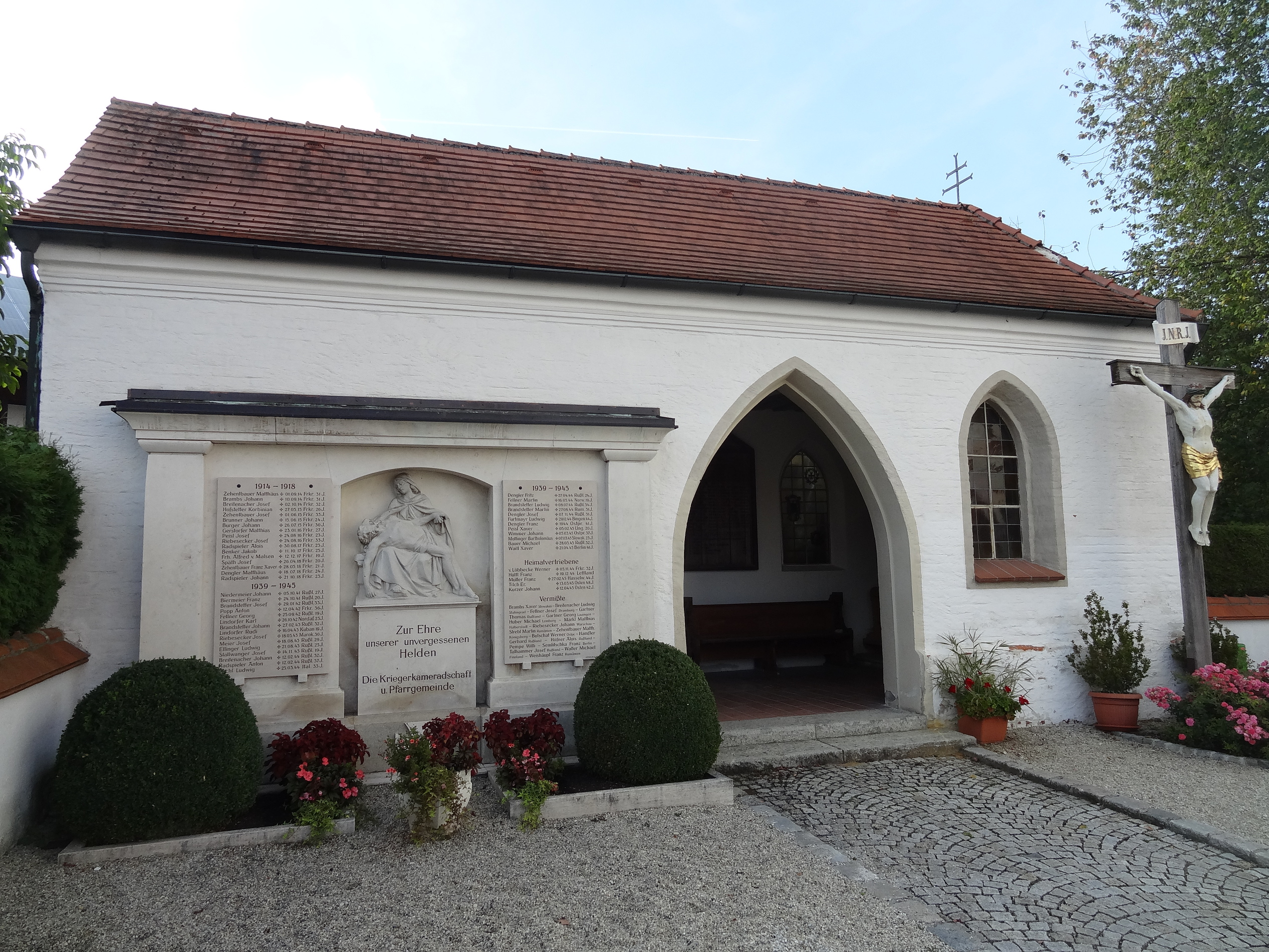 Friedhofskapelle neben der Pfarrkirche St. Johann in Seyboldsdorf (Stadt Vilsbiburg, Lkr. Landshut)